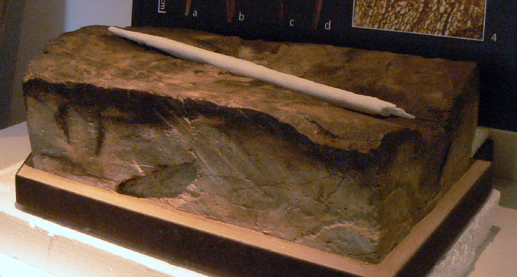 Wurfstock von Schöningen (hier ein Nachbau) in Originalsediment